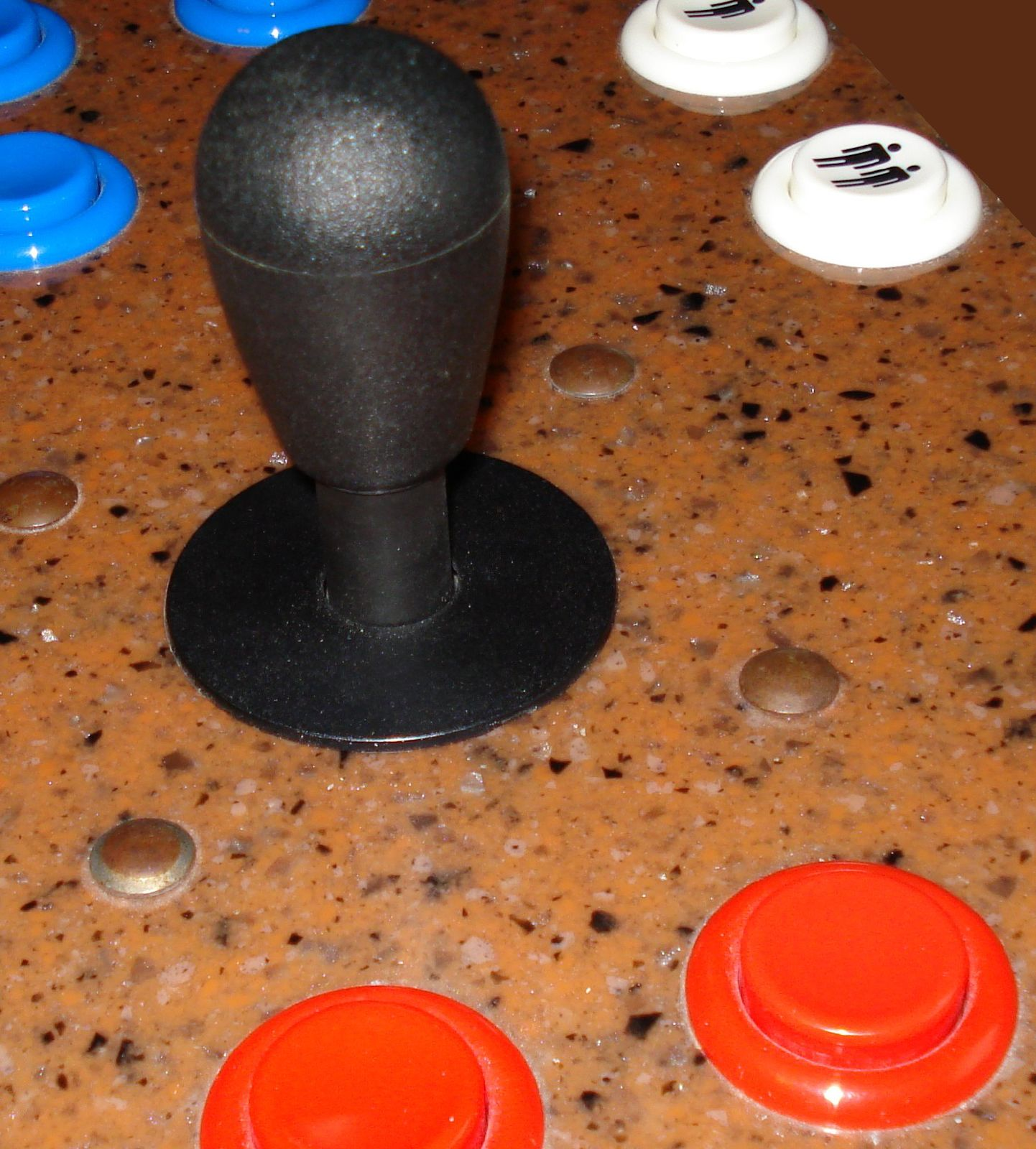 Este es un Joystick para las clasicas maquinas arcade de monedas